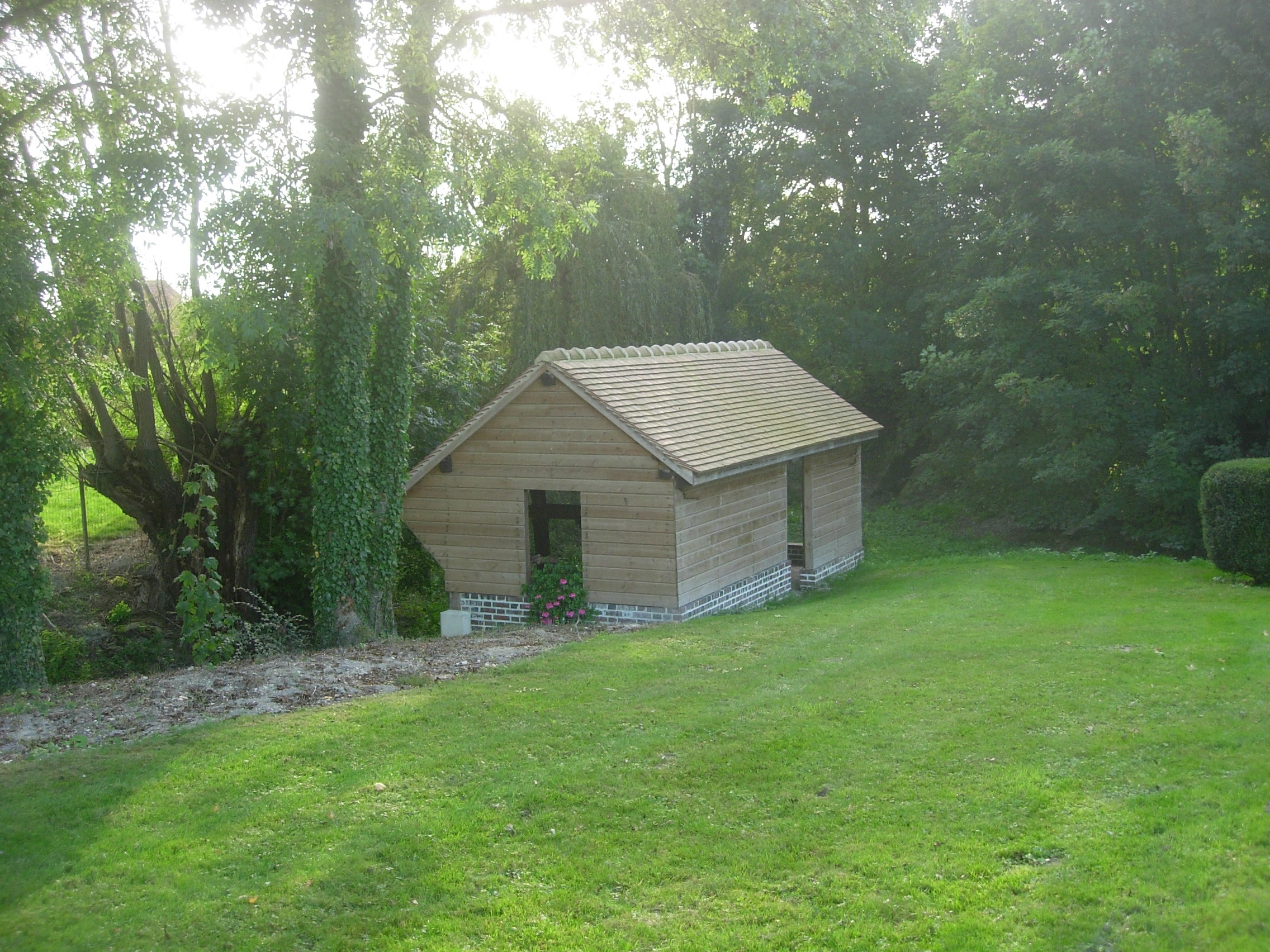 Lavoir de Saint-Flavy (Aube)